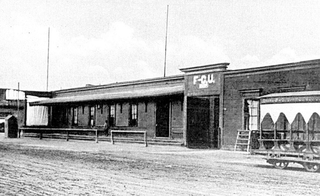 Estación principal y cocheras del Ferrocarril Urbano de Iquique, ubicado en la intersección de las calles Vivar y José Miguel Carrera (actual ubicación del Liceo Politécnico).